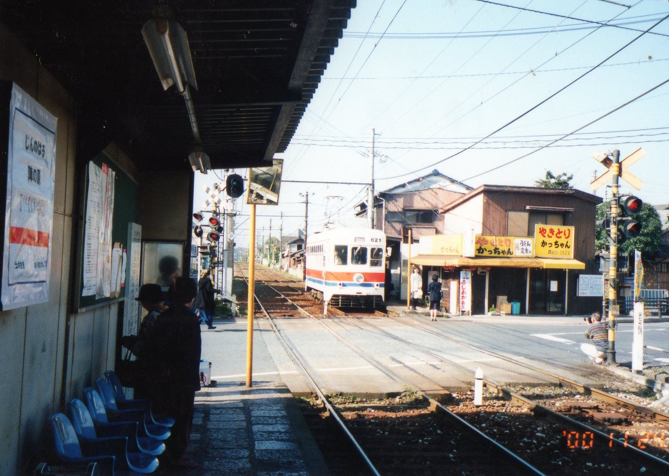 西鉄北九州線陣の原停留場（2000年11月24日）